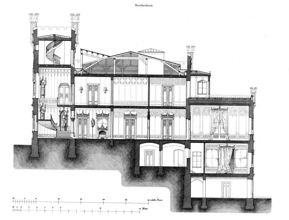 Schnitt durch die Villa Orlando in Loschwitz.